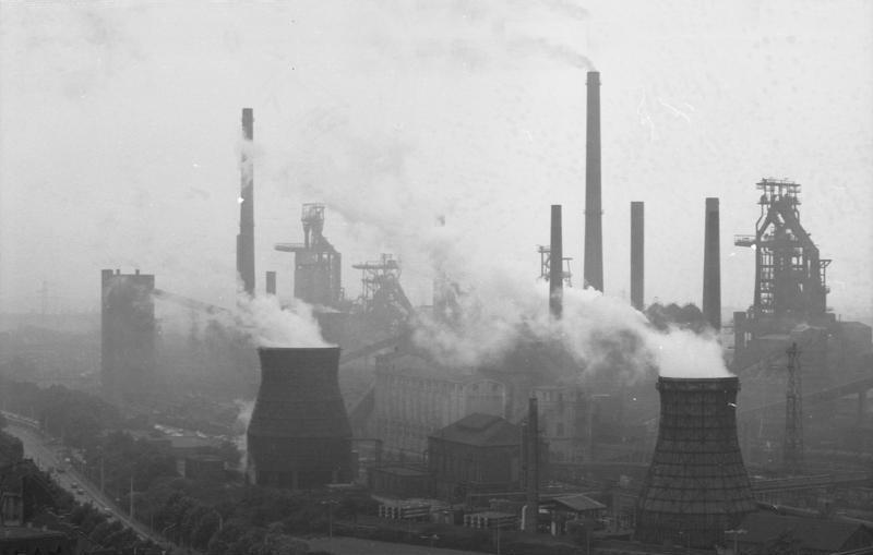 Juni 1988 Duisburg: Thyssen-Stahlwerk mit Hafen